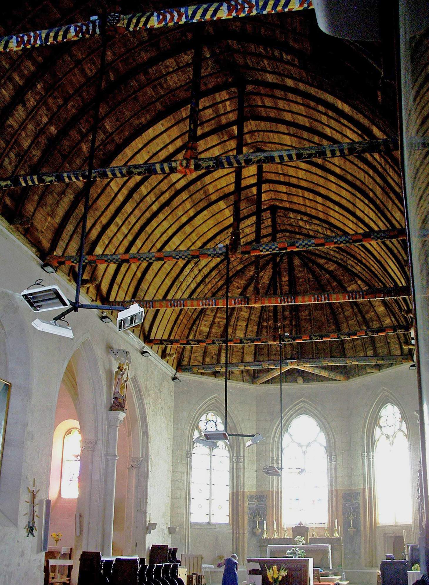 Mézières-en-Brenne - Église Sainte-Marie-Madeleine - Nef